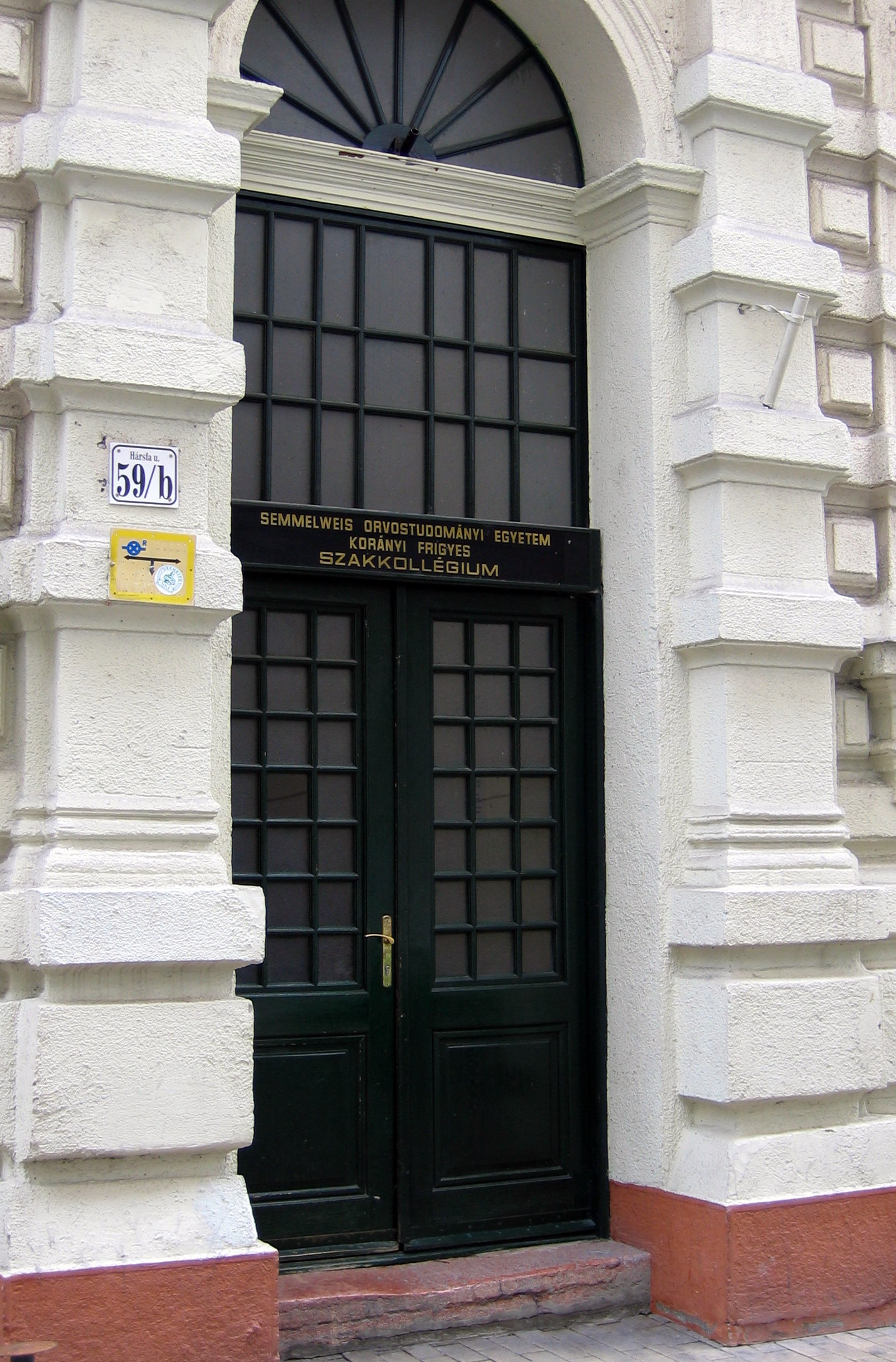 A Korányi Frigyes Szakkollégium bejárata (1074 Budapest, Hársfa utca 59/B)